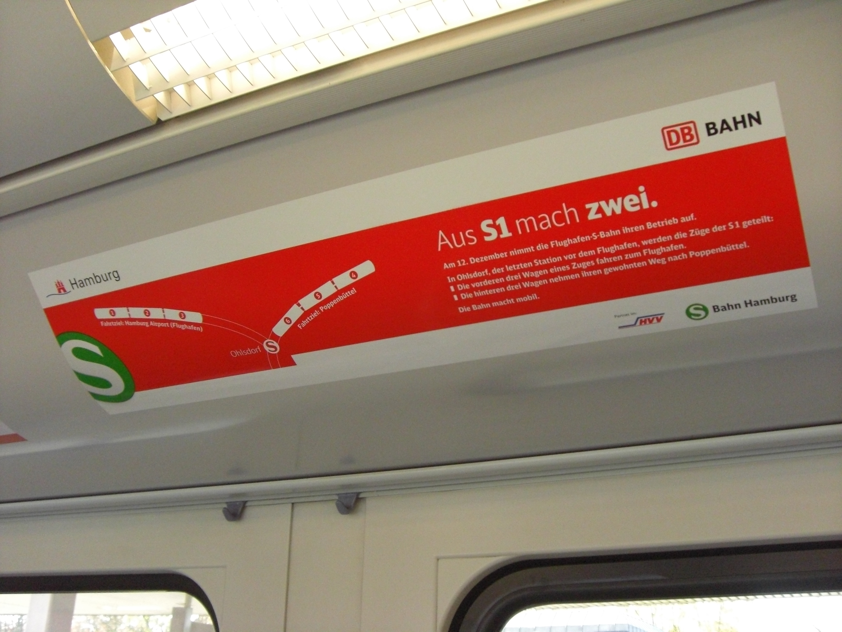 Informationsplakat zur Flügelung der S1 der Hamburger S-Bahn.